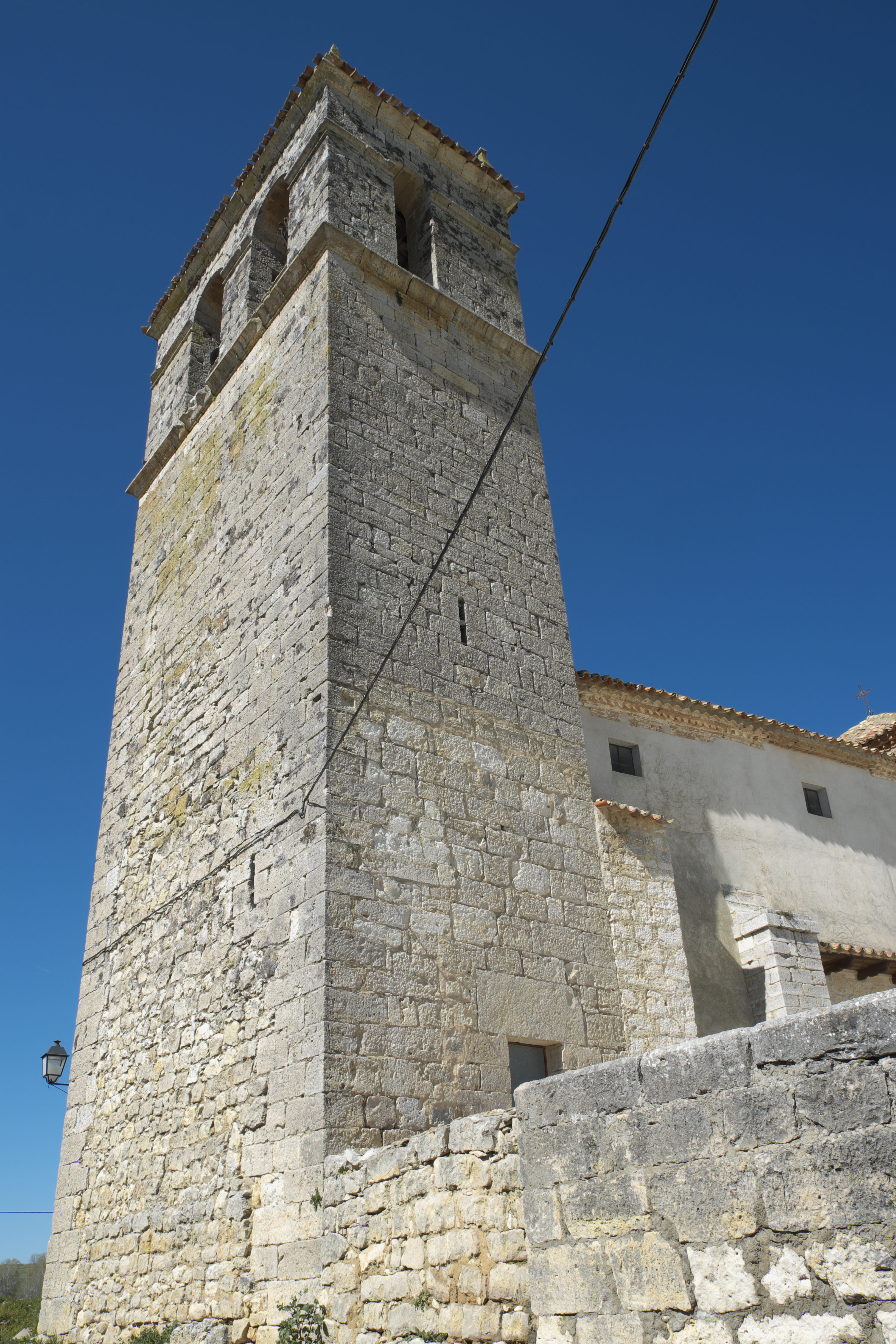 Katholische Pfarrkirche San Andrés in Pobladura de Sotiedra, einem Ort in der Gemeinde Tiedra in der Provinz Valladolid (Kastilien-León/Spanien), Glockenturm